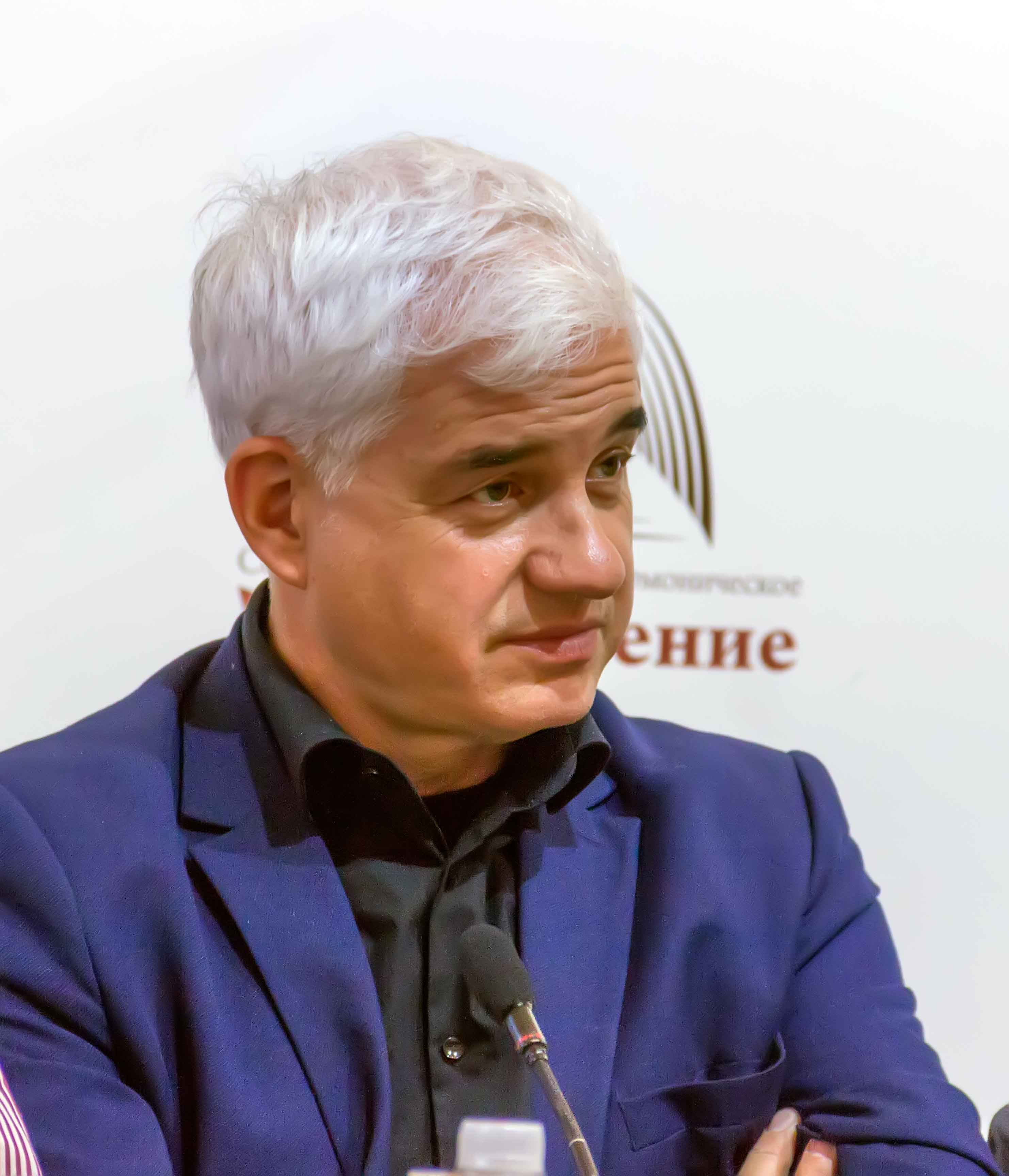 Пресс-конференция